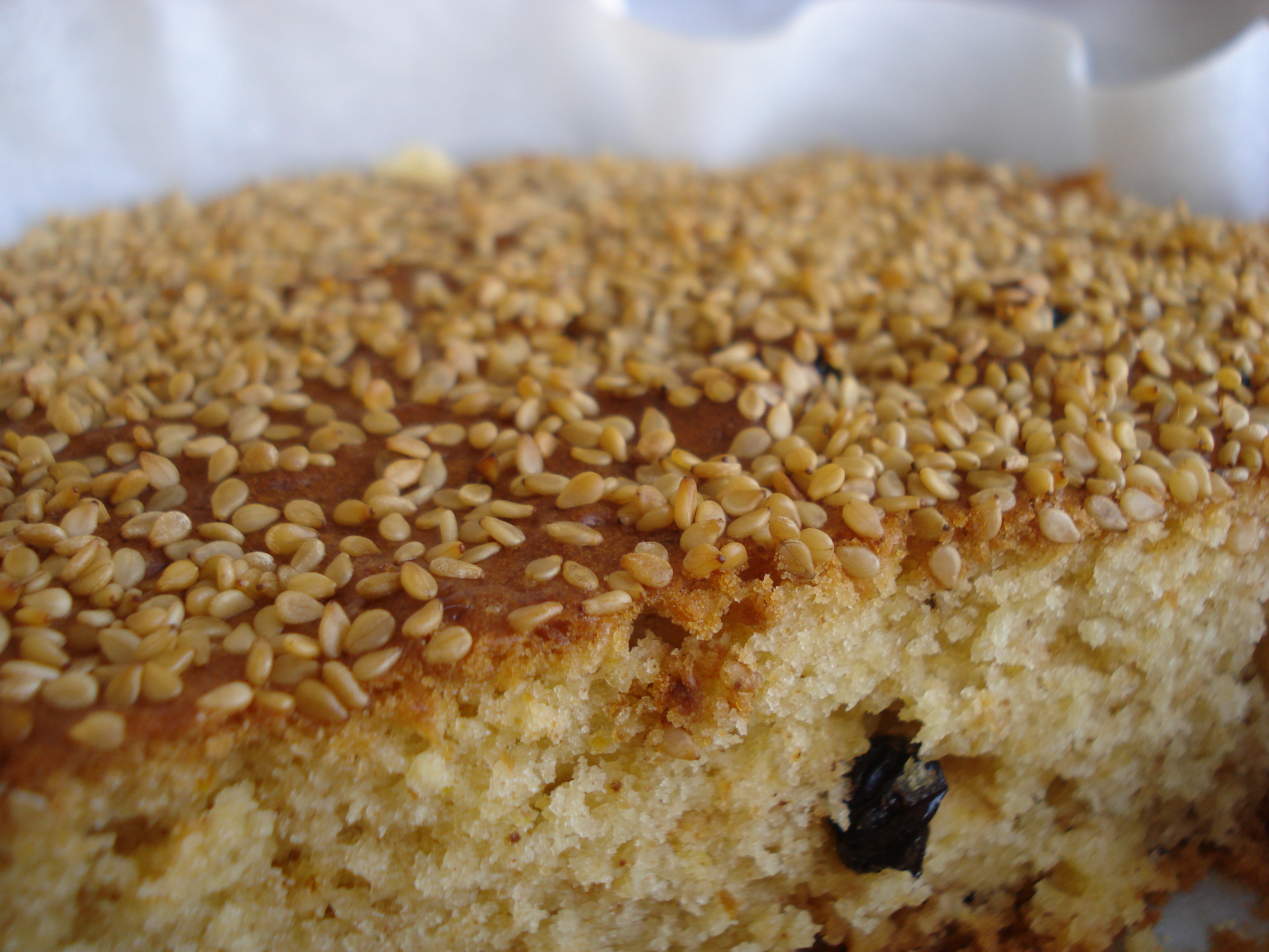 Fanourópita amb sèsam i panses.